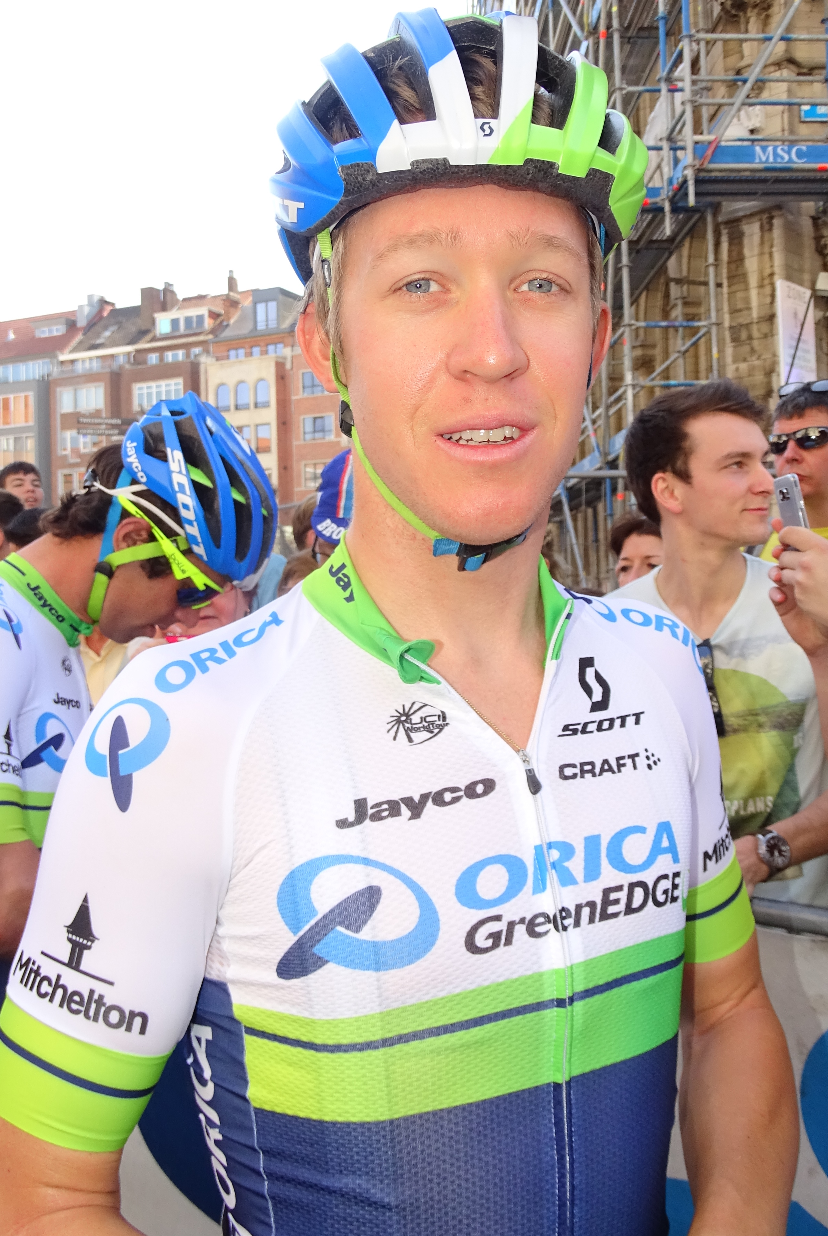 Reportage réalisé le mercredi 15 avril à l'occasion du départ de la Flèche brabançonne 2015 à Louvain, Belgique.